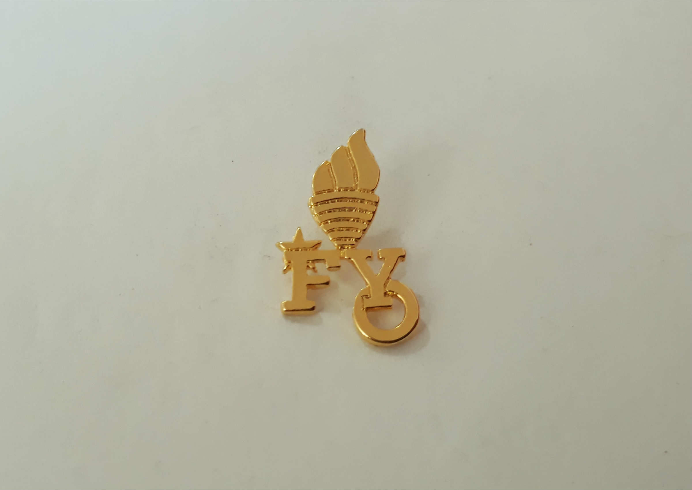 FYO spolet işareti